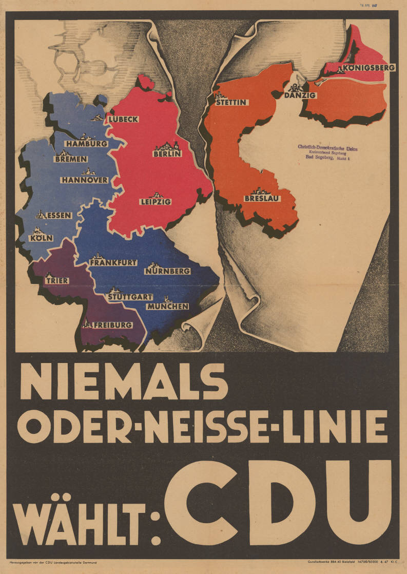 Niemals Oder-Neisse-Linie Wählt: CDU Abbildung: Geteiltes Deutschland (Besatzungszonen/Grafik) Kommentar: Vgl. Landtagswahlplakat Nordrhein-Westfalen Nr. 10-009-21. Ein Plakat trägt auf auf der Vorderseite den Stempel des CDU Kreisverbandes Segeberg. Plakatart: Motiv-/Textplakat Auftraggeber: CDU Landesgebietsstelle Dortmund Drucker_Druckart_Druckort: Gundlachwerke BBA 40 Bielefeld 14726/50 000 4. 47 Kl. C Objekt-Signatur: 10-012 : 5 Bestand: Landtagswahlplakate Schleswig-Holstein (10-012) GliederungBestand10-18: Landtagswahlplakate Schleswig-Holstein (10-012) » CDU Lizenz: KAS/ACDP 10-012 : 5 CC-BY-SA 3.0 DE